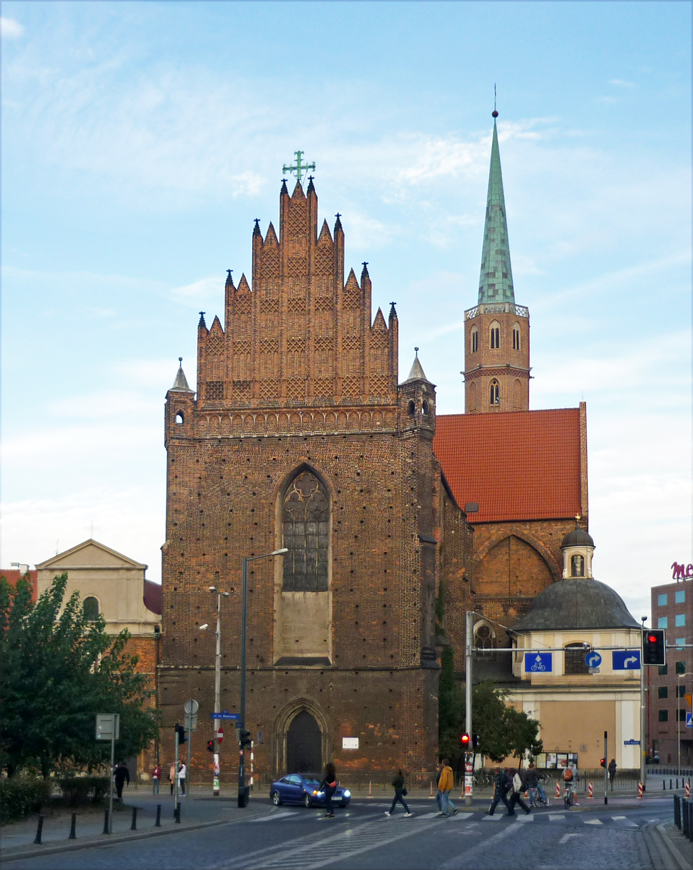 Dominikanerkirche in Breslau